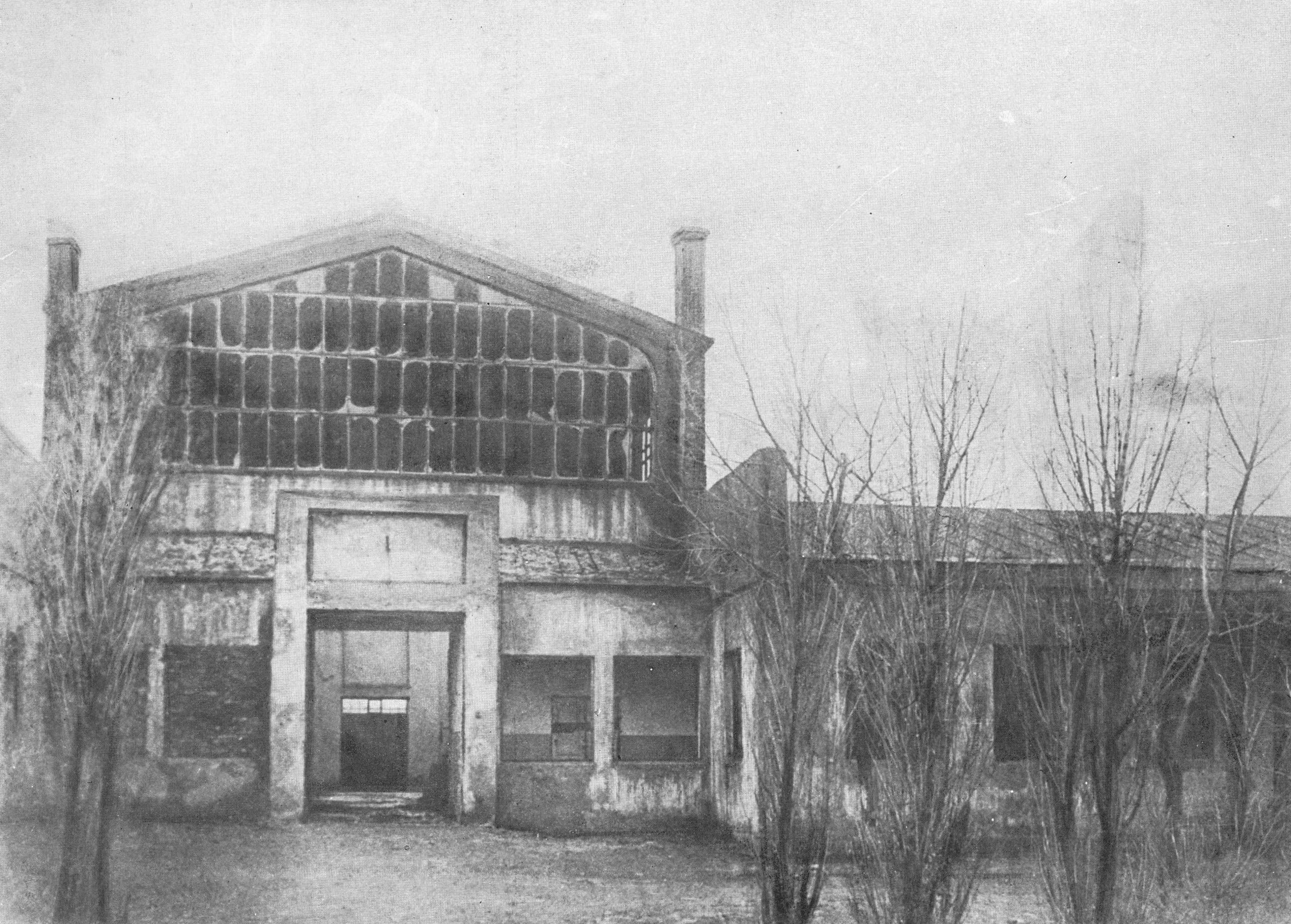 Разрушенное во время войны здание научно-исследовательской лаборатории рудничного подъёма и транспорта, 1943 год